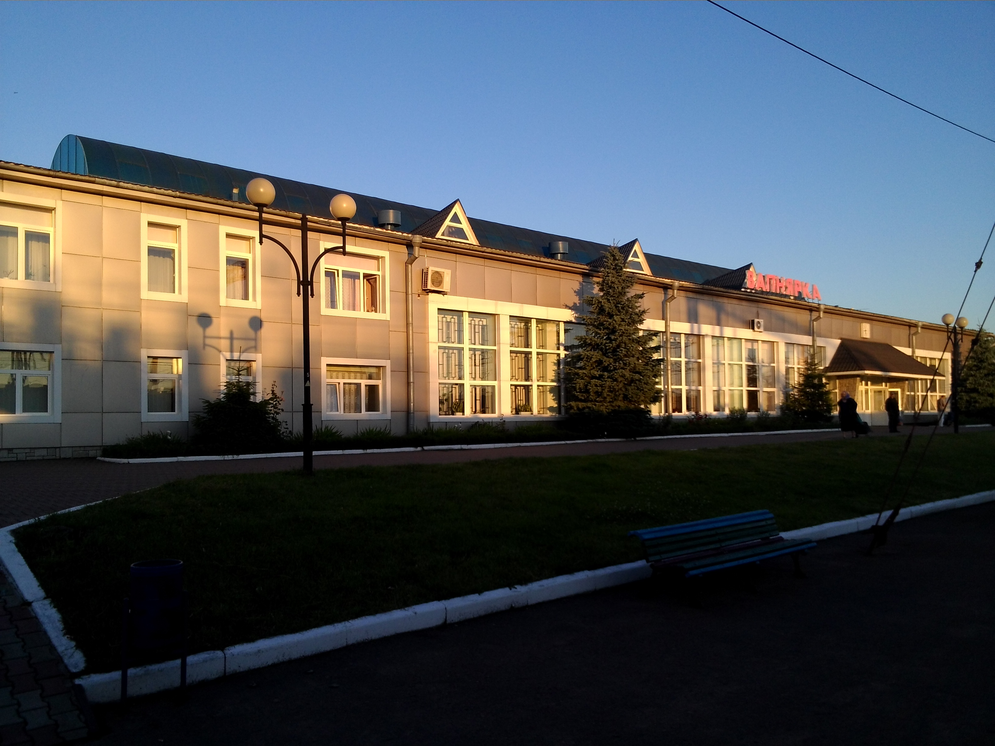 Станція Вапнярка